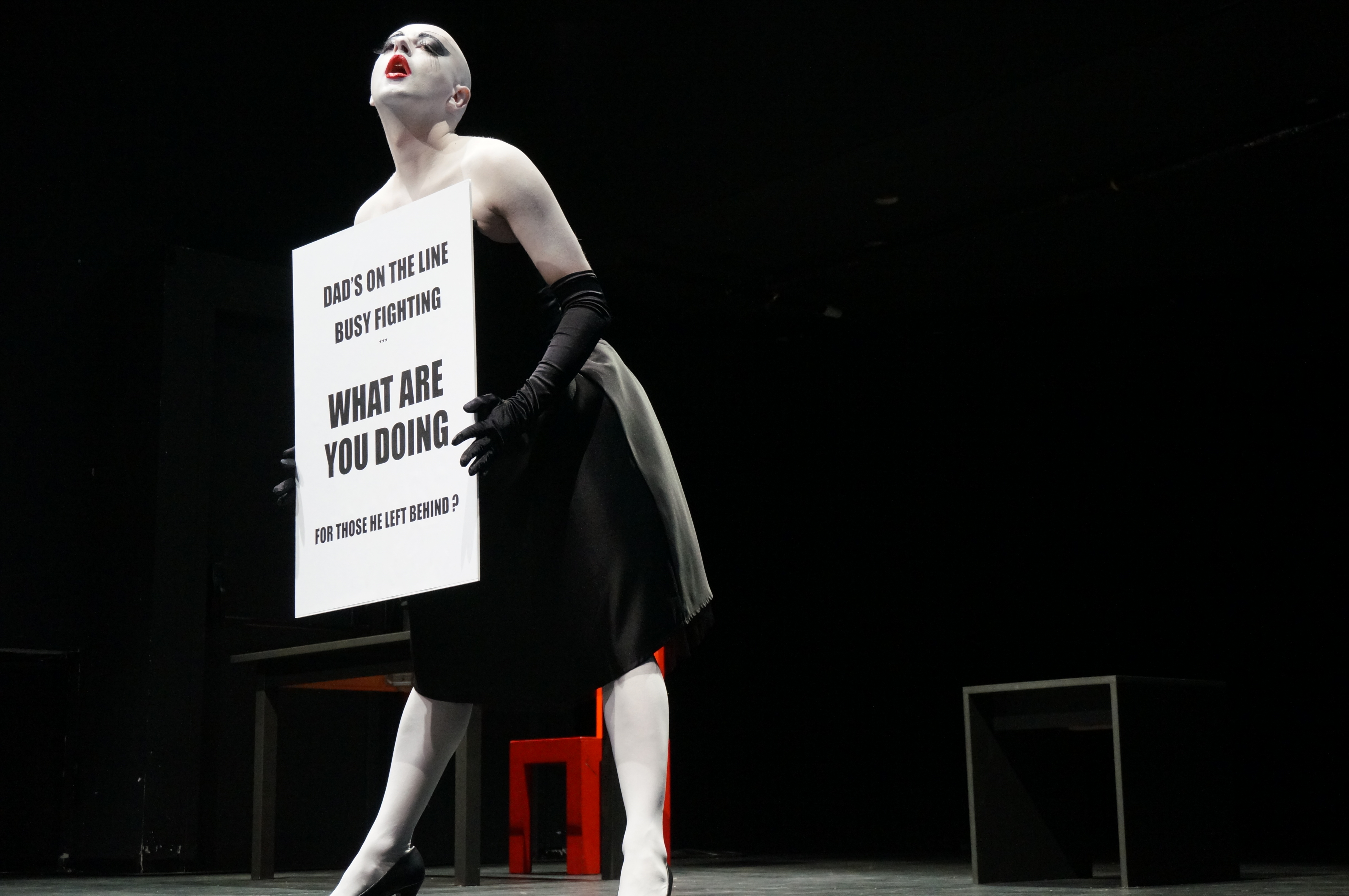 Lors de anniversaire #7 de Reims scènes d’Europe 2015.